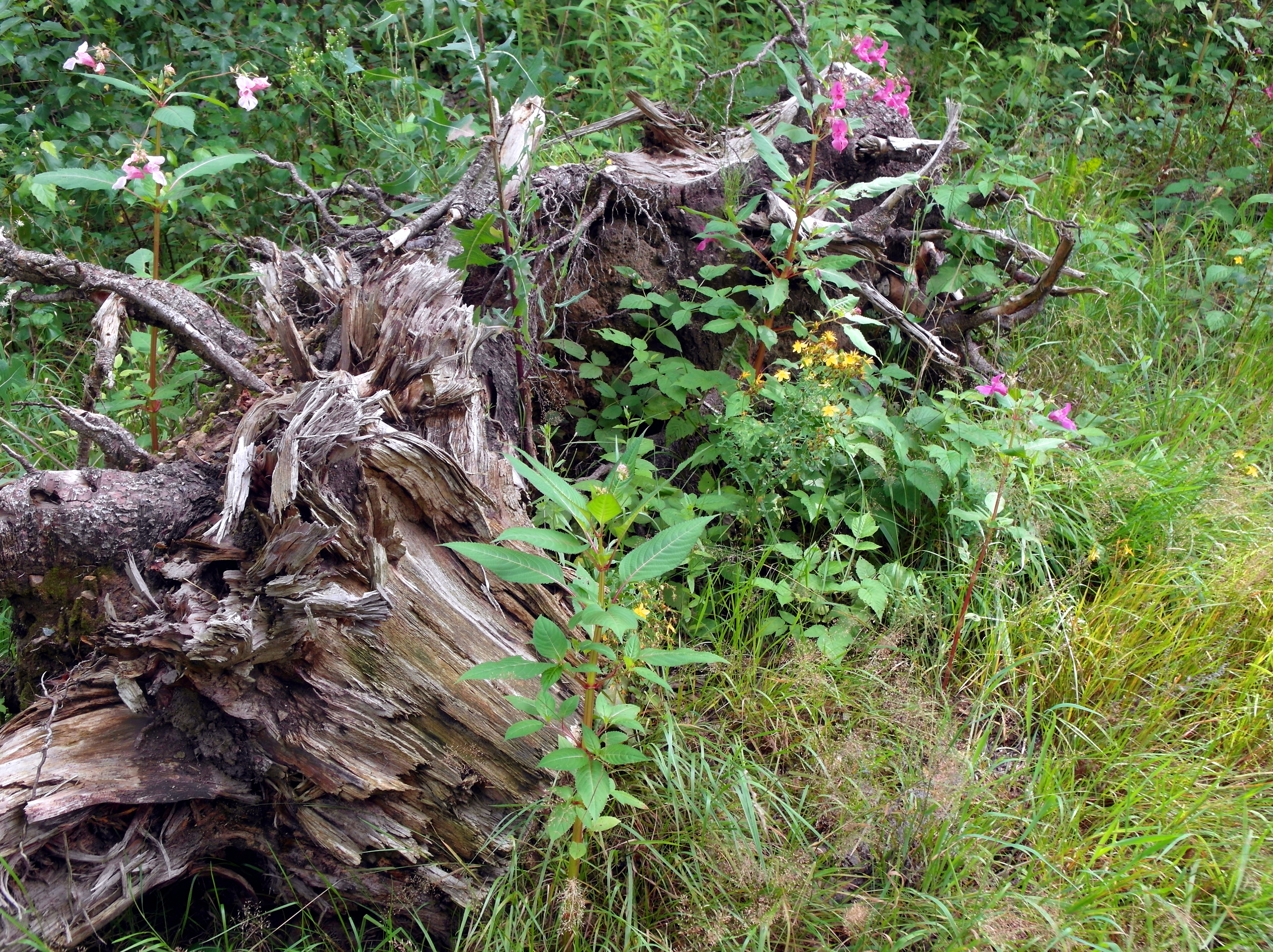 06.08.2017 09599 Halsbach / Neuhilbersdorf (Freiberg): Baumstubben an der Freiberger Mulde im Gebiet der ehem. Papiermühle Oberes Muldental 1, 5, 7 (GMP: 50.918733,13.380242). [SAM1317.JPG]20170806345DR.JPG(c)Blobelt